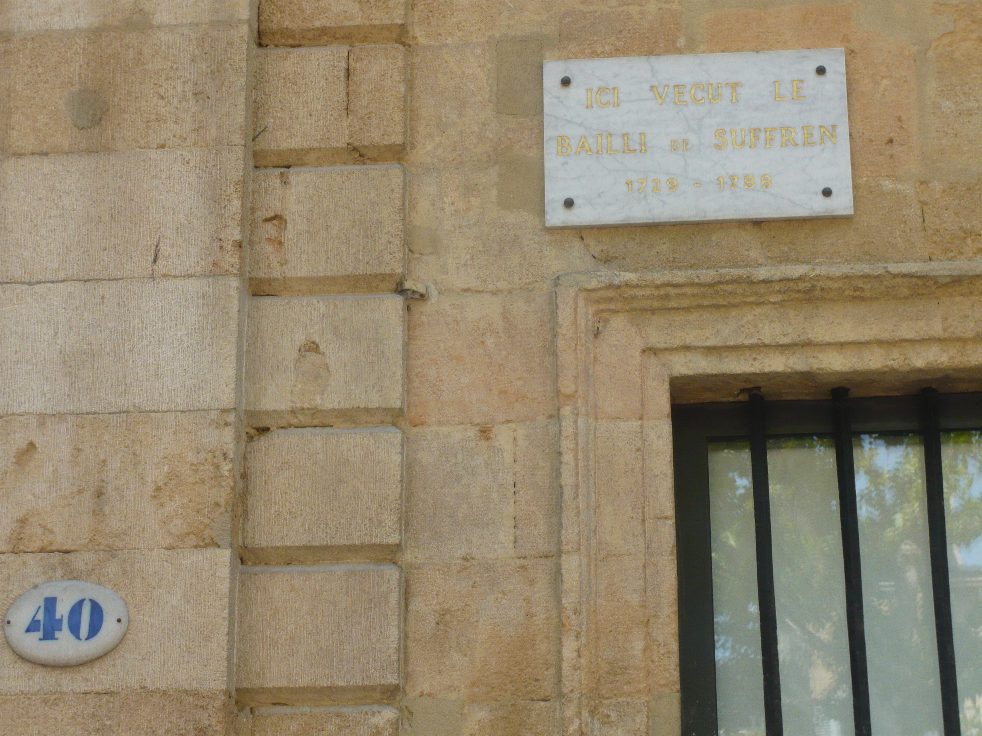 Plaque Bailli Pierre André de Suffren, hôtel de Suffren 40 cours Mirabeau, Aix-en-Provence (France).